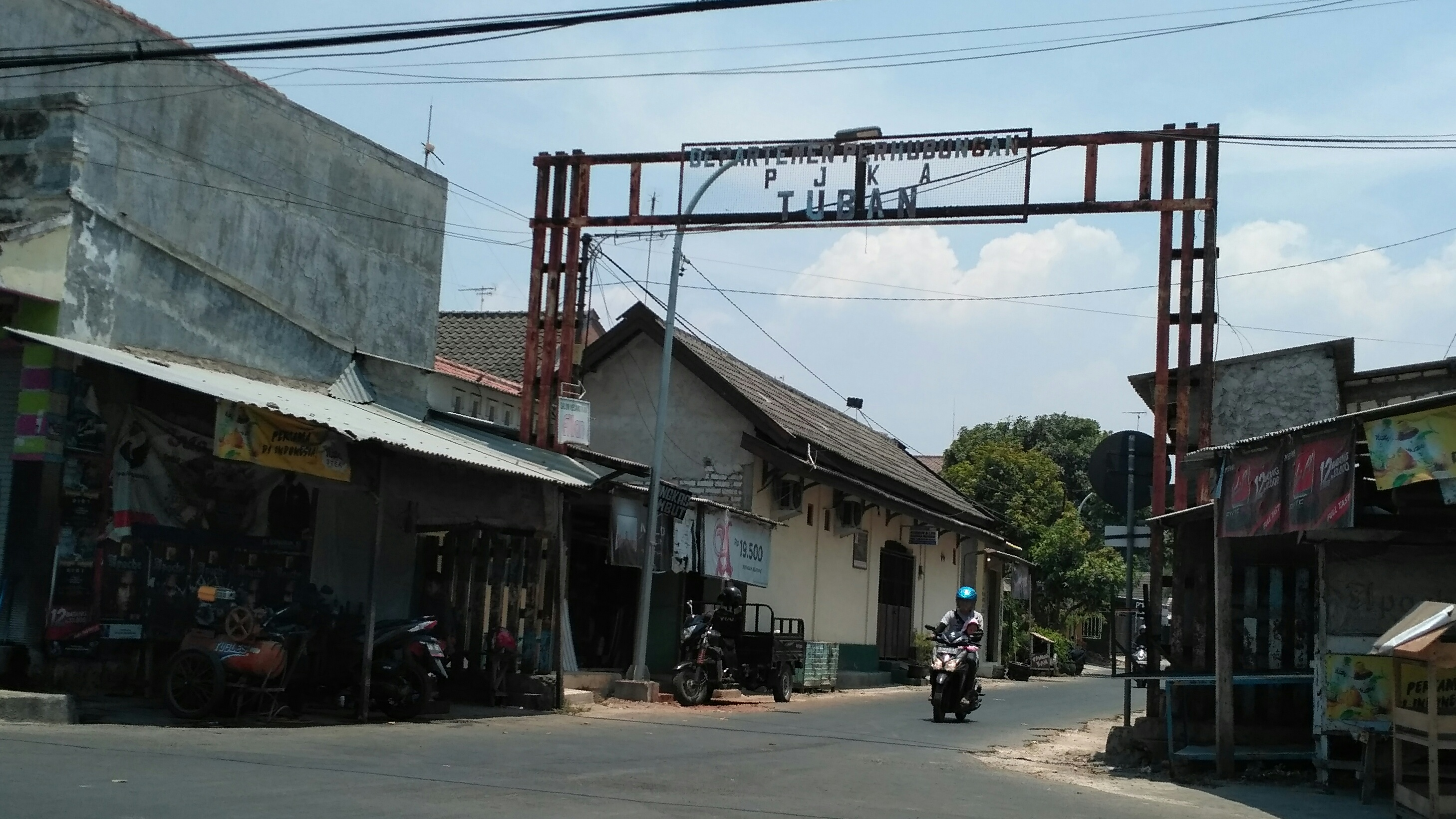 Gerbang masuk utama menuju Stasiun Tuban yang berada di Perempatan Stasiun Tuban di sisi selatan jalan Basuki Rahmat. Secara fisik, gapura ini terbuat dari besi logam dan memiliki warna cat biru dan putih. Tetapi, seiring berjalannya waktu warna cat tersebut mengelupas dan akhirnya berkarat seperti dalam foto di atas.